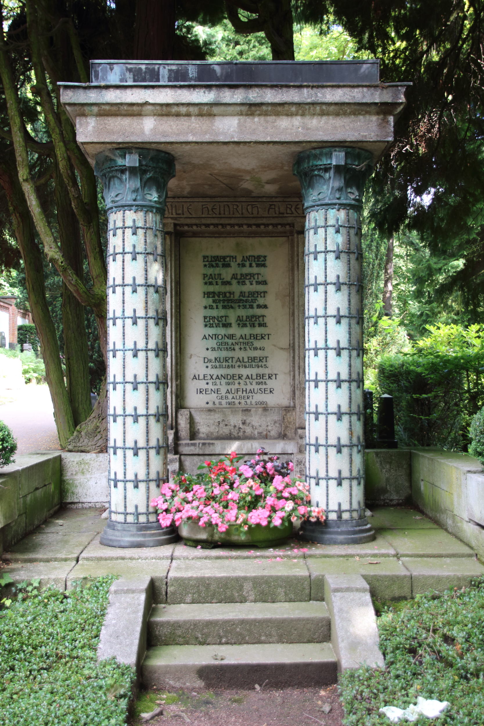 Grabmal Familie Heinrich Albert (1834-1908). Architekt: Johannes Baader, Bildhauer: Franz Metzner. Nordfriedhof Wiesbaden